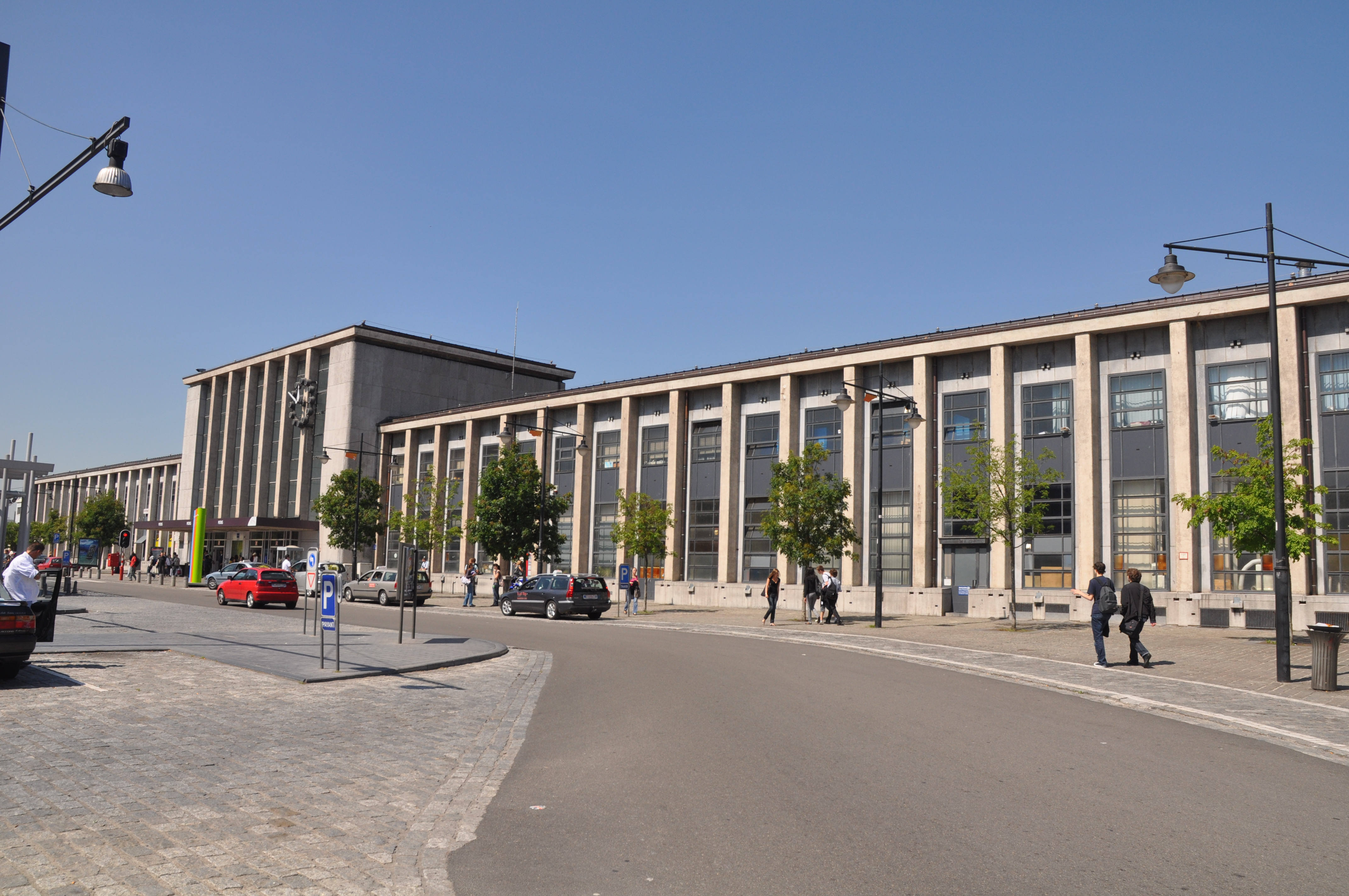 De René Panis construite après la seconde guerre mondiale vouée à la destruction avant la construction de la gare de Calatrava